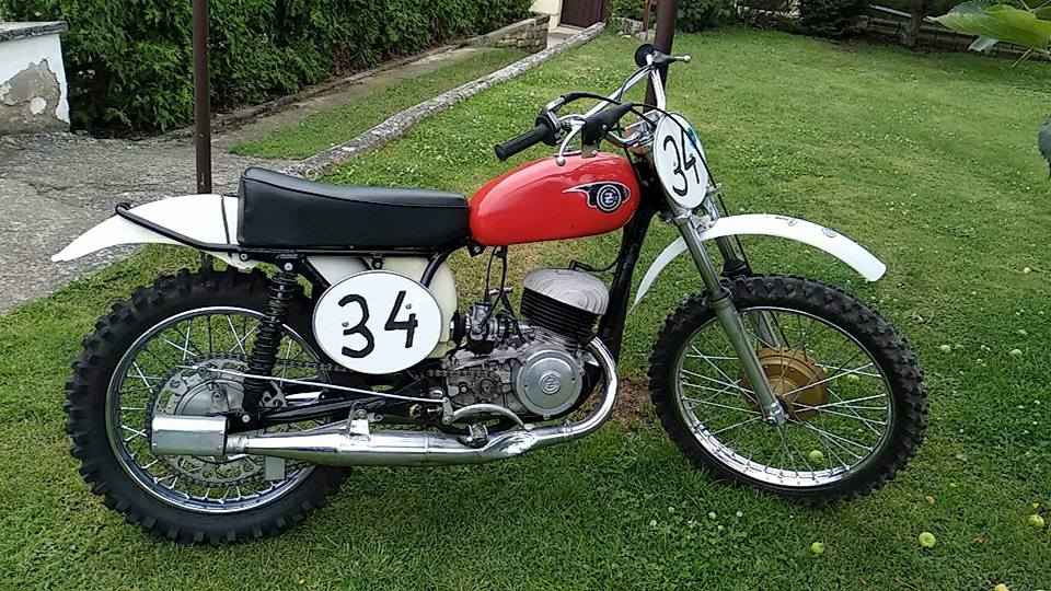 Motocykl ČZ 250/968